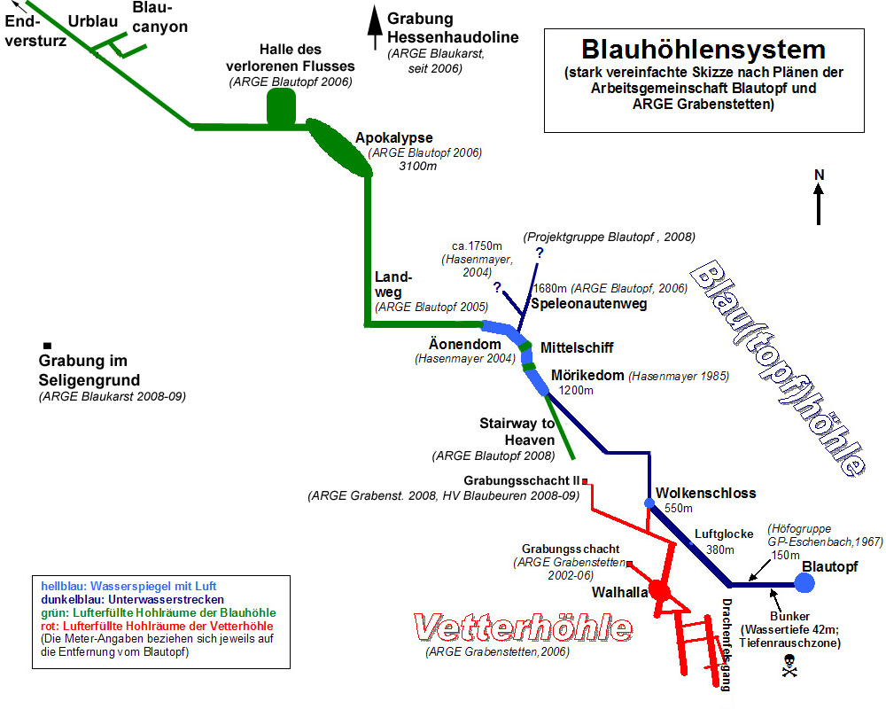 Planskizze des Blauhöhlensystems (Forschungsstand Dezember 2007)